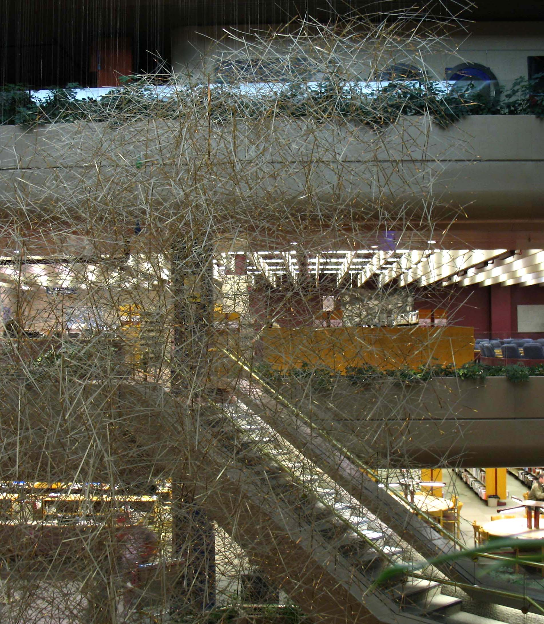 Sculpture de Micheline Beauchemin. « Il semble y avoir comme une pluie d'or », 1983. Tiges d'aluminium fini miroir or et fils d'acier inoxydable. Bibliothèque Gabrielle-Roy, quartier de Saint-Roch, Ville de Québec, Québec, Canada. Programme d’intégration des arts à l’architecture et à l'environnement (1%).